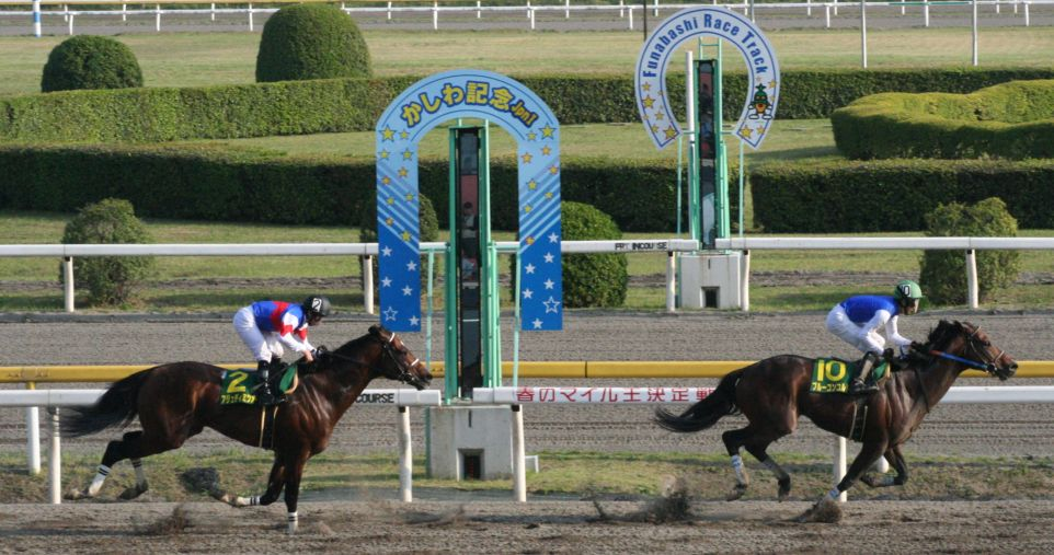 かしわ記念 JpnI 2007年5月2日